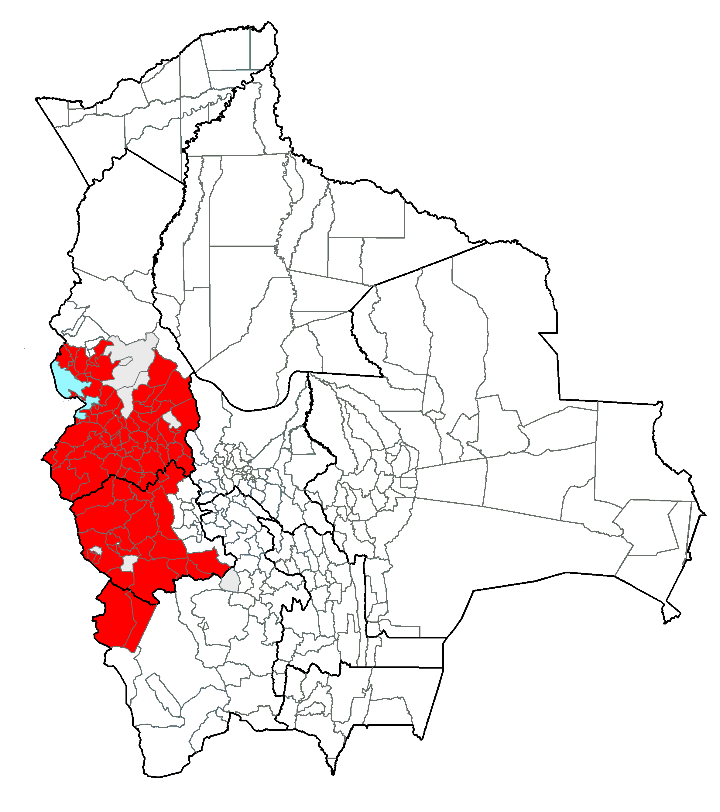 Divisiones administrativas de Bolivia que pertenecen al dominio lingüístico del idioma aimara. En rojo, las demarcaciones aimarahablantes; en azul celeste, el lago Titicaca; en gris, zonas de las que no se cuenta con datos; en blanco, zonas no aimarahablantes